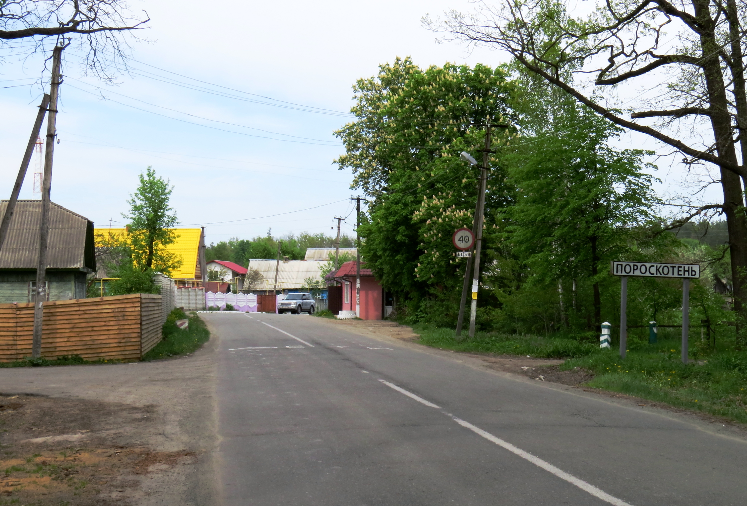 село Пороскотень. В'їзд з боку Плахтянки, Макарова